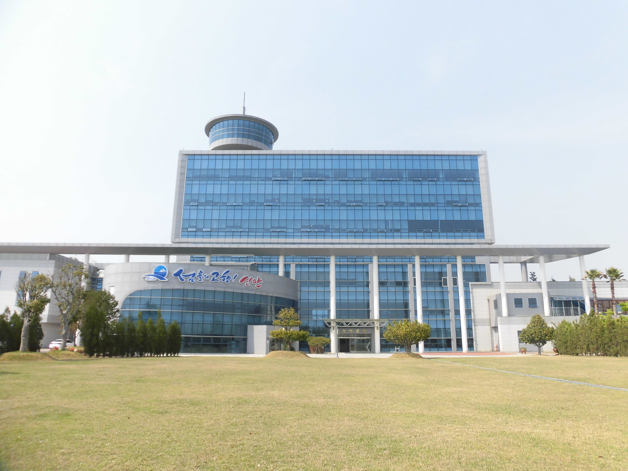 전라남도 신안군에 있는 신안군청